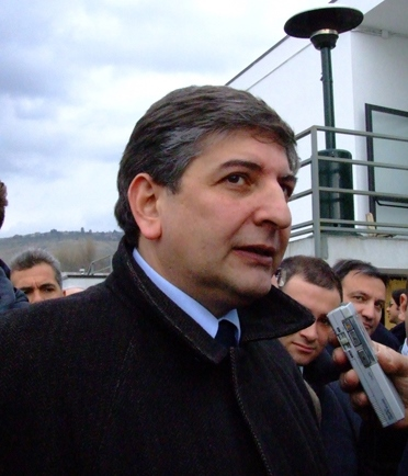 Il ministro Mario Landolfi durante un'intervista a Caserta.